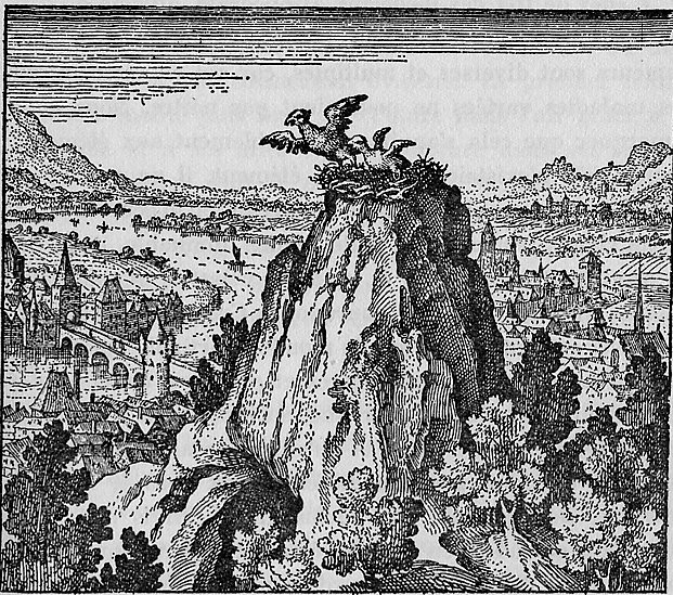 Emblem 7